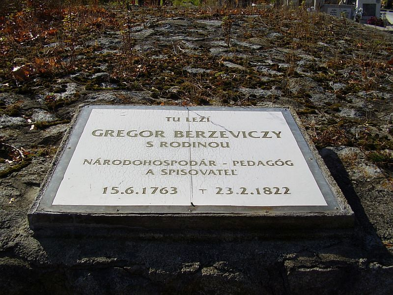 Gergely Berzeviczy tomb in Velka Lomnica - Slovakia